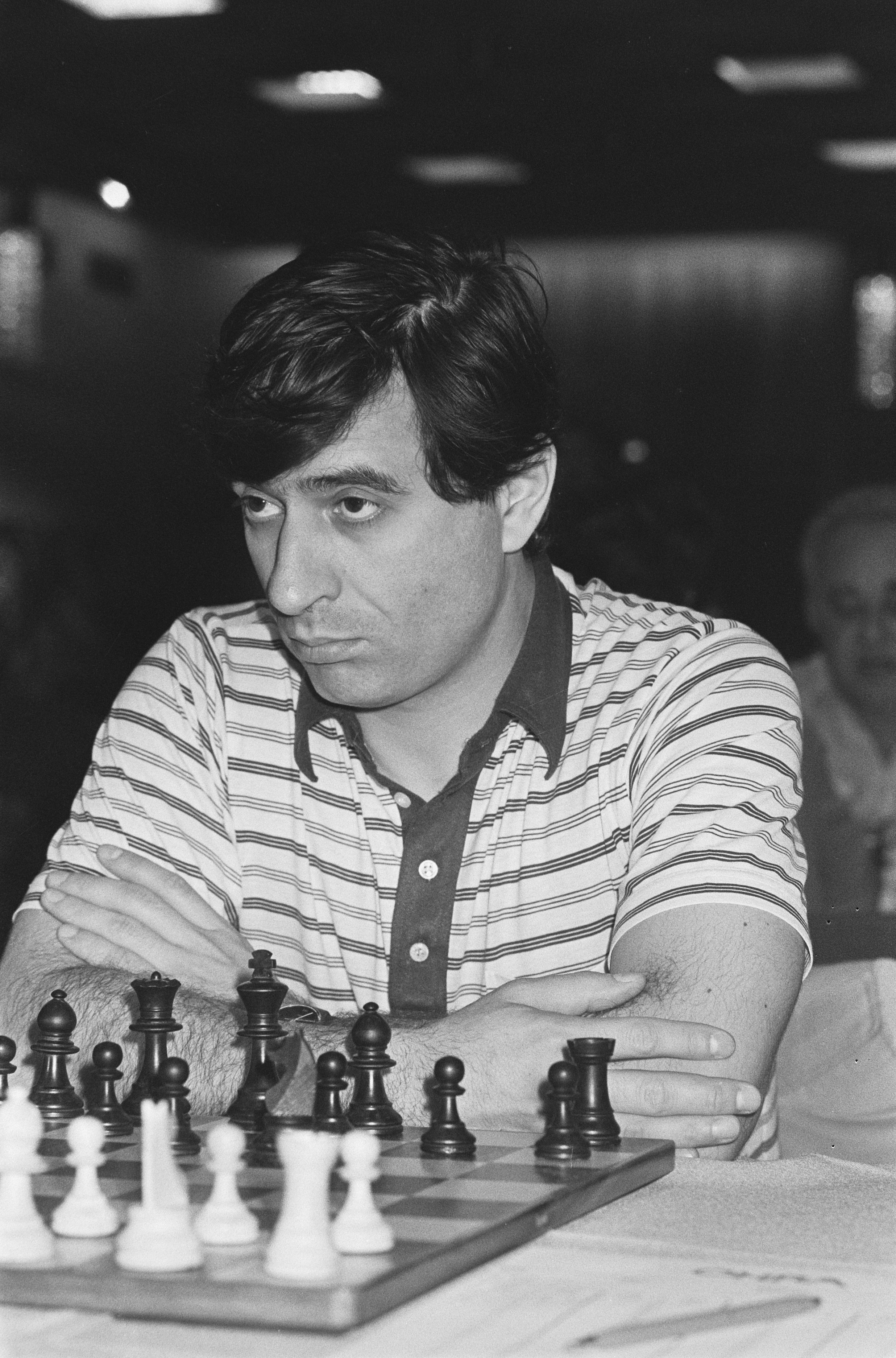 Collectie / Archief : Fotocollectie Anefo Reportage / Serie : [ onbekend ] Beschrijving : Ohra-Schaaktoernooi zevende ronde; Ljubojevic close met schaakbord Datum : 28 juli 1986 Trefwoorden : schaken, toernooien Fotograaf : Molendijk, Bart / Anefo Auteursrechthebbende : Nationaal Archief Materiaalsoort : Negatief (zwart/wit) Nummer archiefinventaris : bekijk toegang 2.24.01.05 Bestanddeelnummer : 933-7172